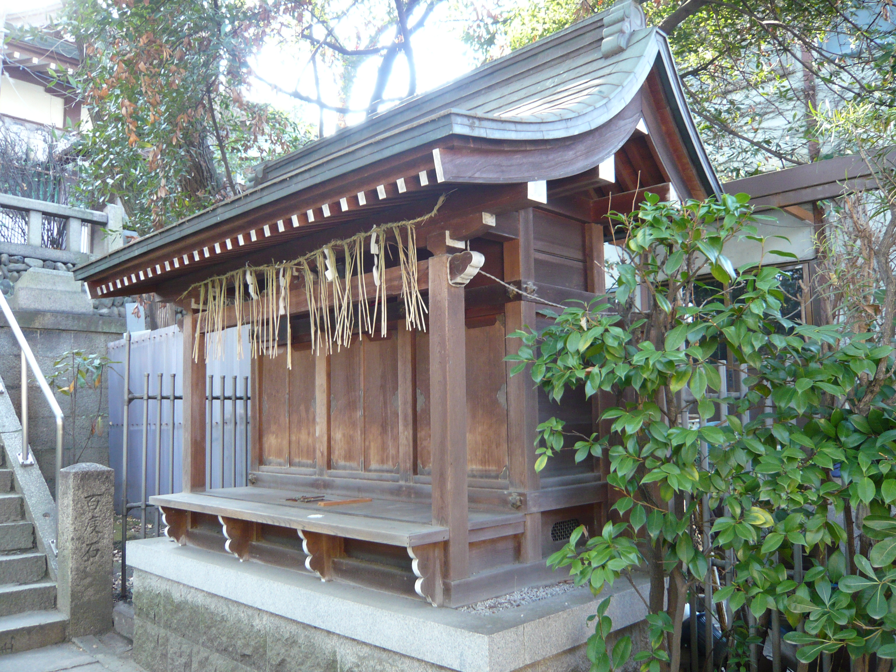 Sankō-jinja, Tennōji, Ōsaka, Ōsaka, Japan 三光神社（大阪市天王寺区）末社三社（武内宿禰社・野見宿禰社・主守稲荷社）